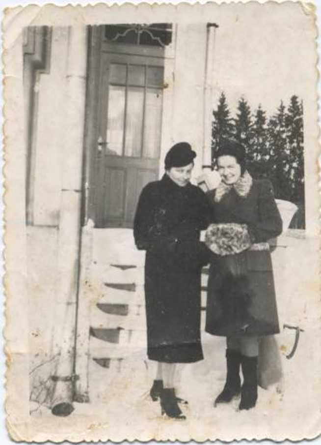 נשות קהילת טעטש ב